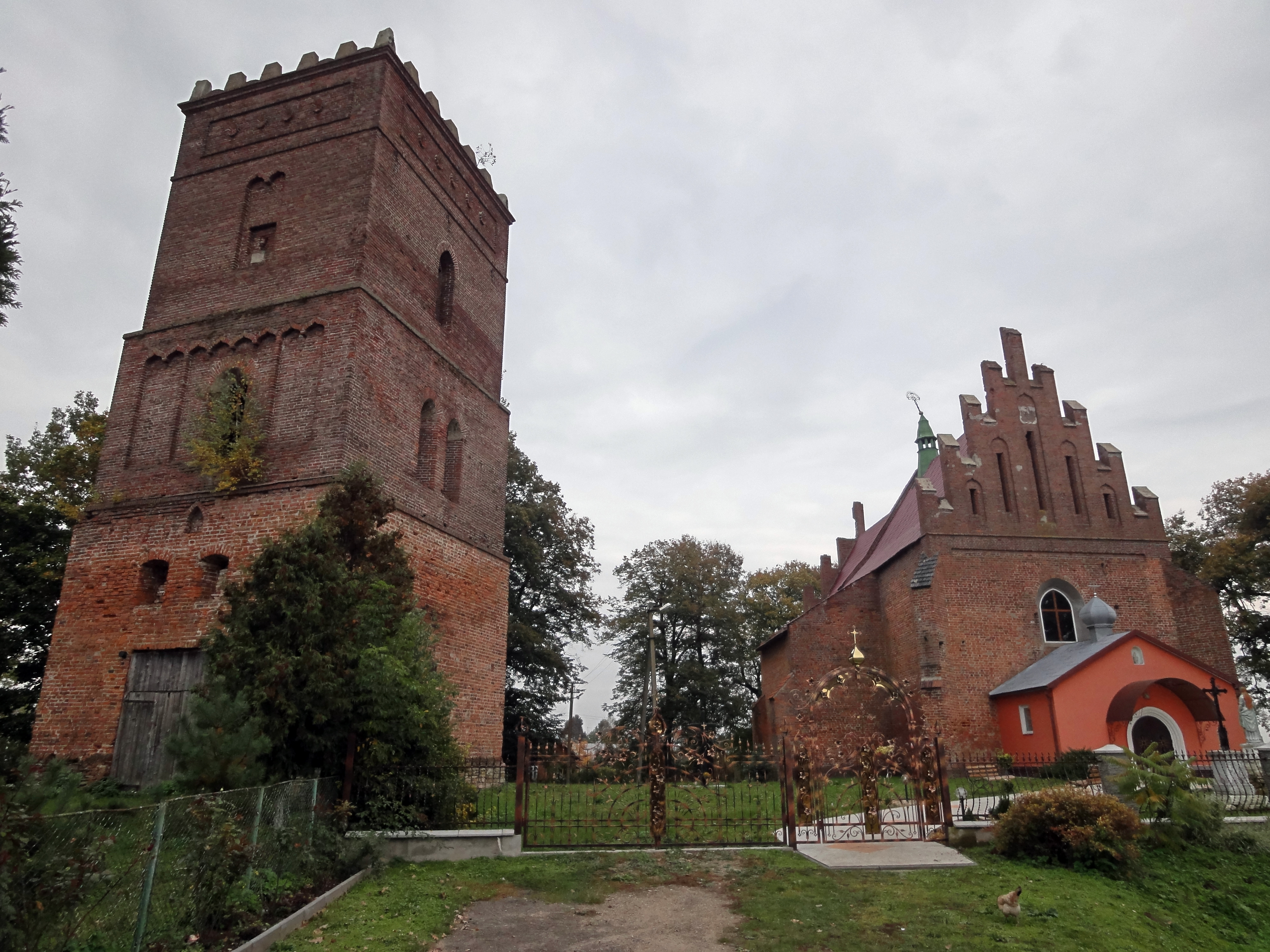 Костел Св.Мартина (мур.), с.Скелівка